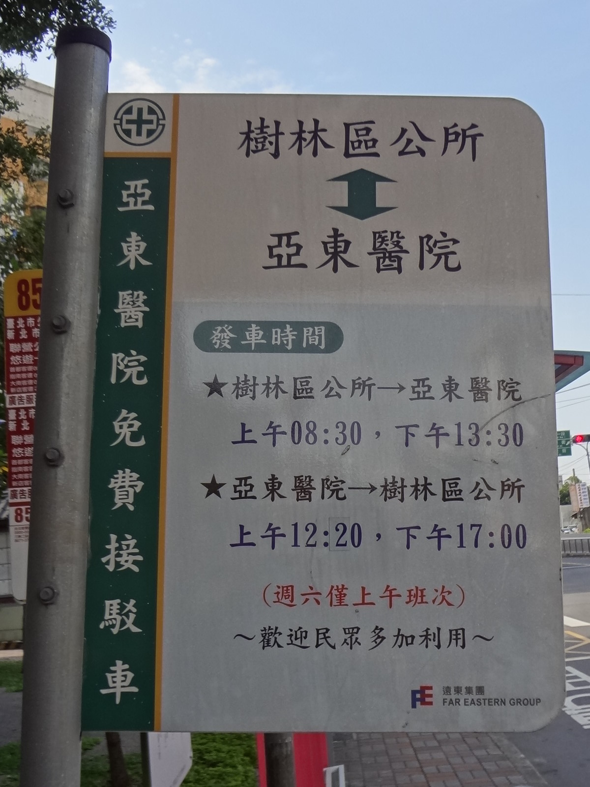 中文（台灣）: 新北市樹林區公所大門前，亞東醫院免費接駁車站牌。